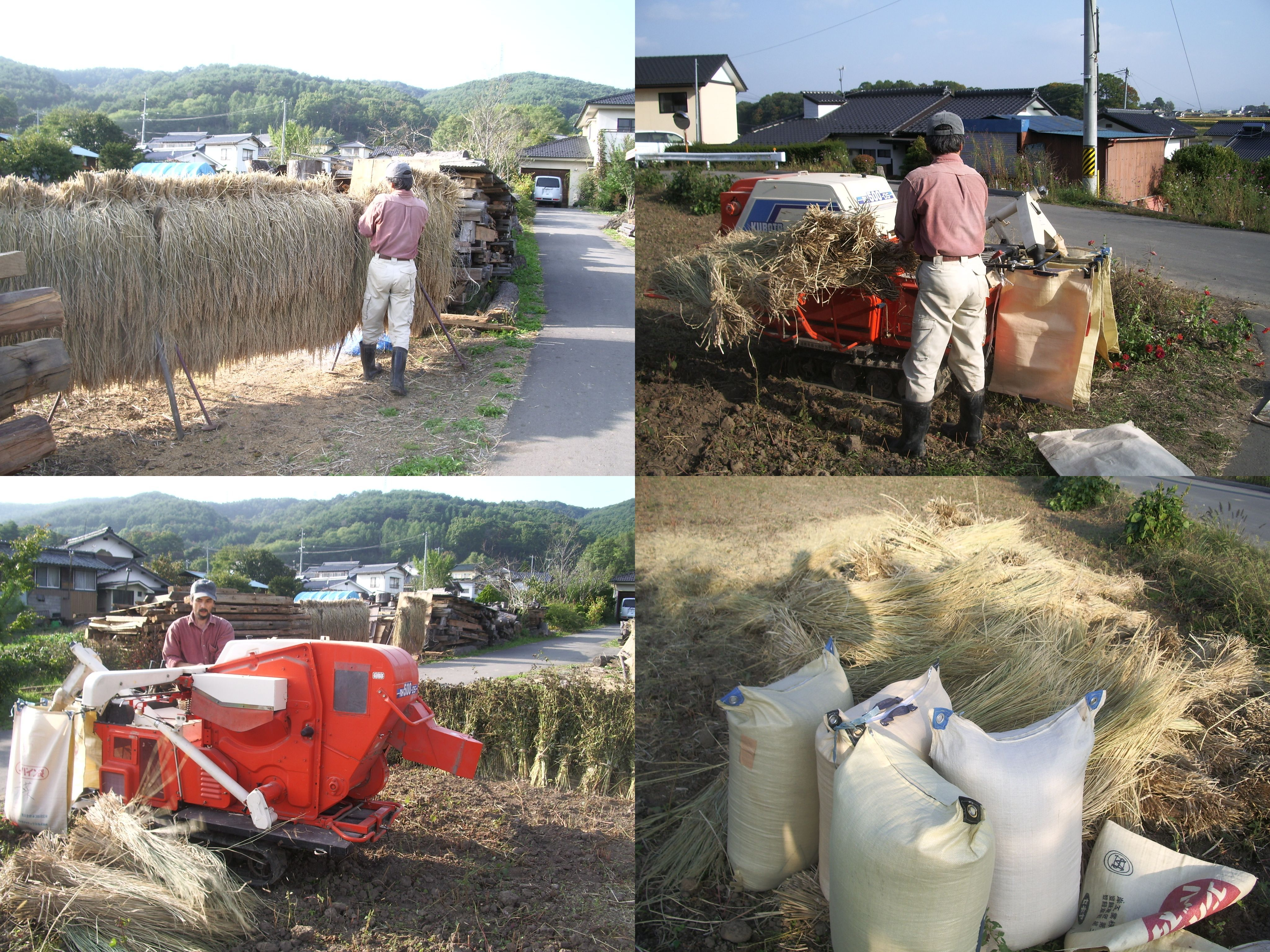 ハーベスターによる乾燥稲の脱穀